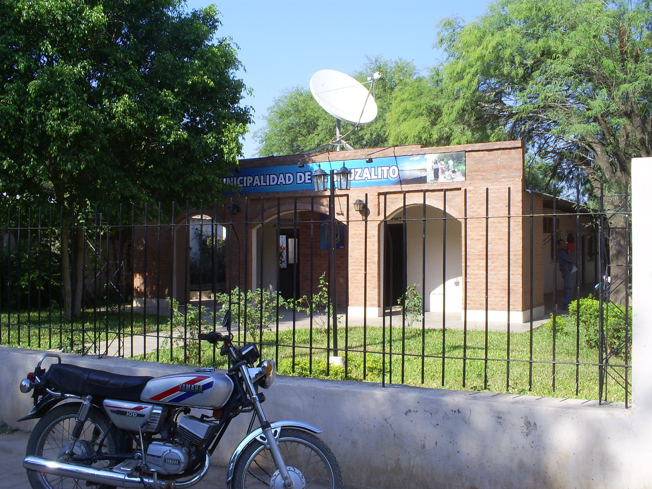 Municipalidad de El Sauzalito